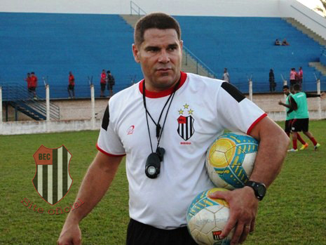 Léo Goiano em treinamento do Bandeirante-SP